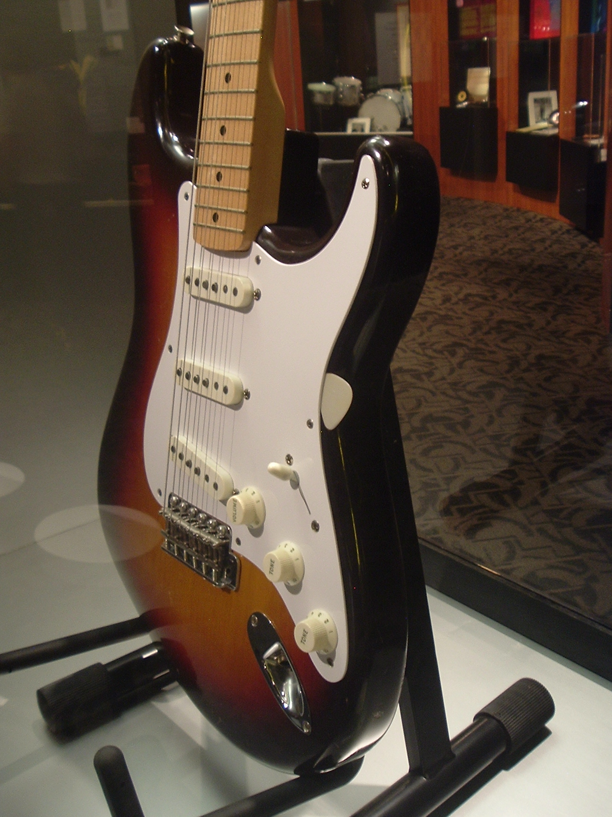 Guitarra eléctrica Stratocaster de Buddy Holly. La uso en su última gira.